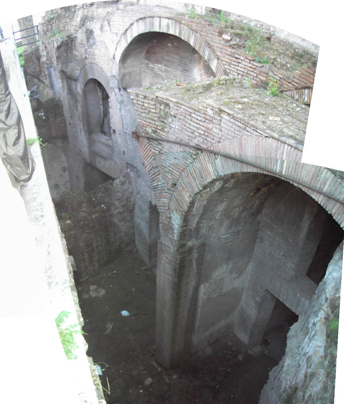 Roma, insula romana dell'Aracoeli: piani inferiori